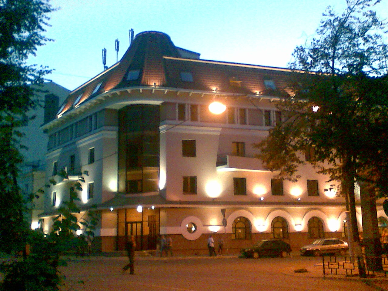 Арт-Отель в Воронеже